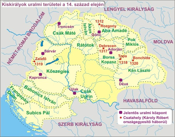 Ungarische Kleinkönigtümer zu Beginn des 14. Jahrhunderts